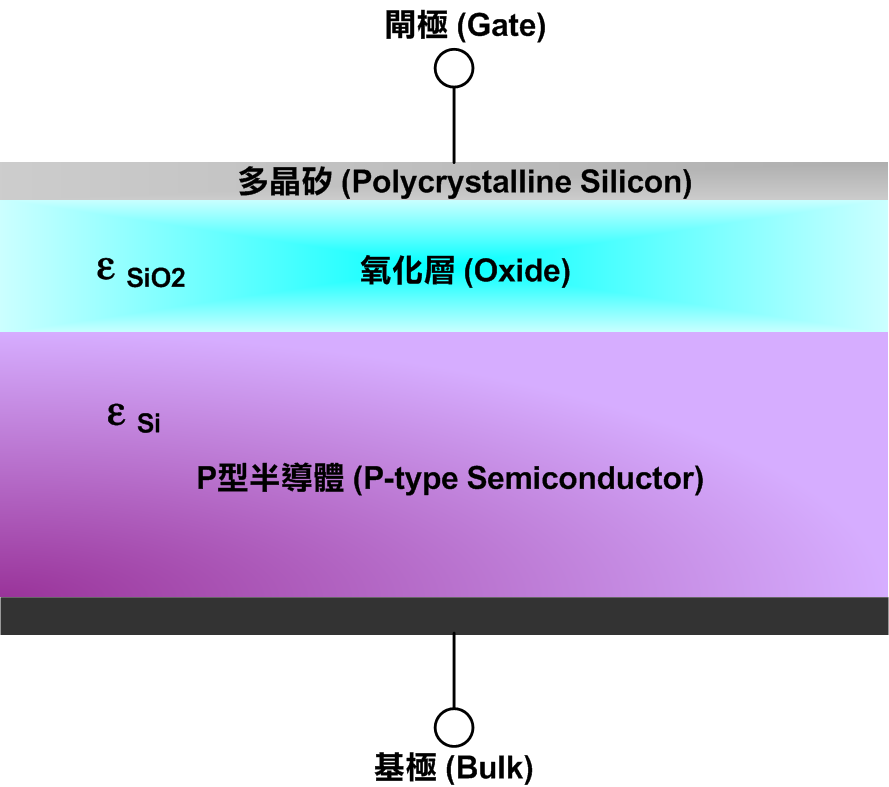 MOS電容截面圖